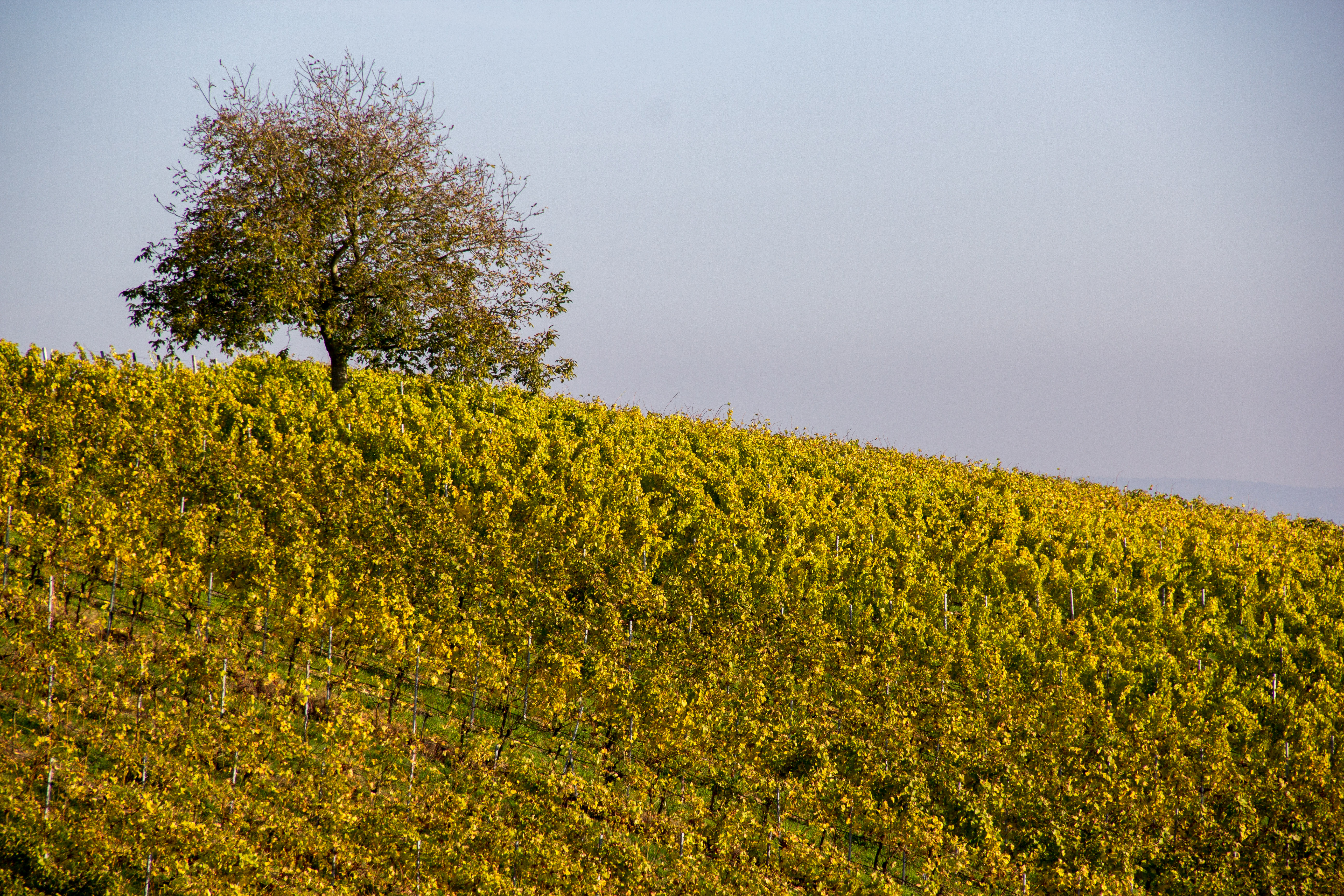 Weininsel, Main, Sommerach, Nordheim, LSG Volkacher Mainschleife